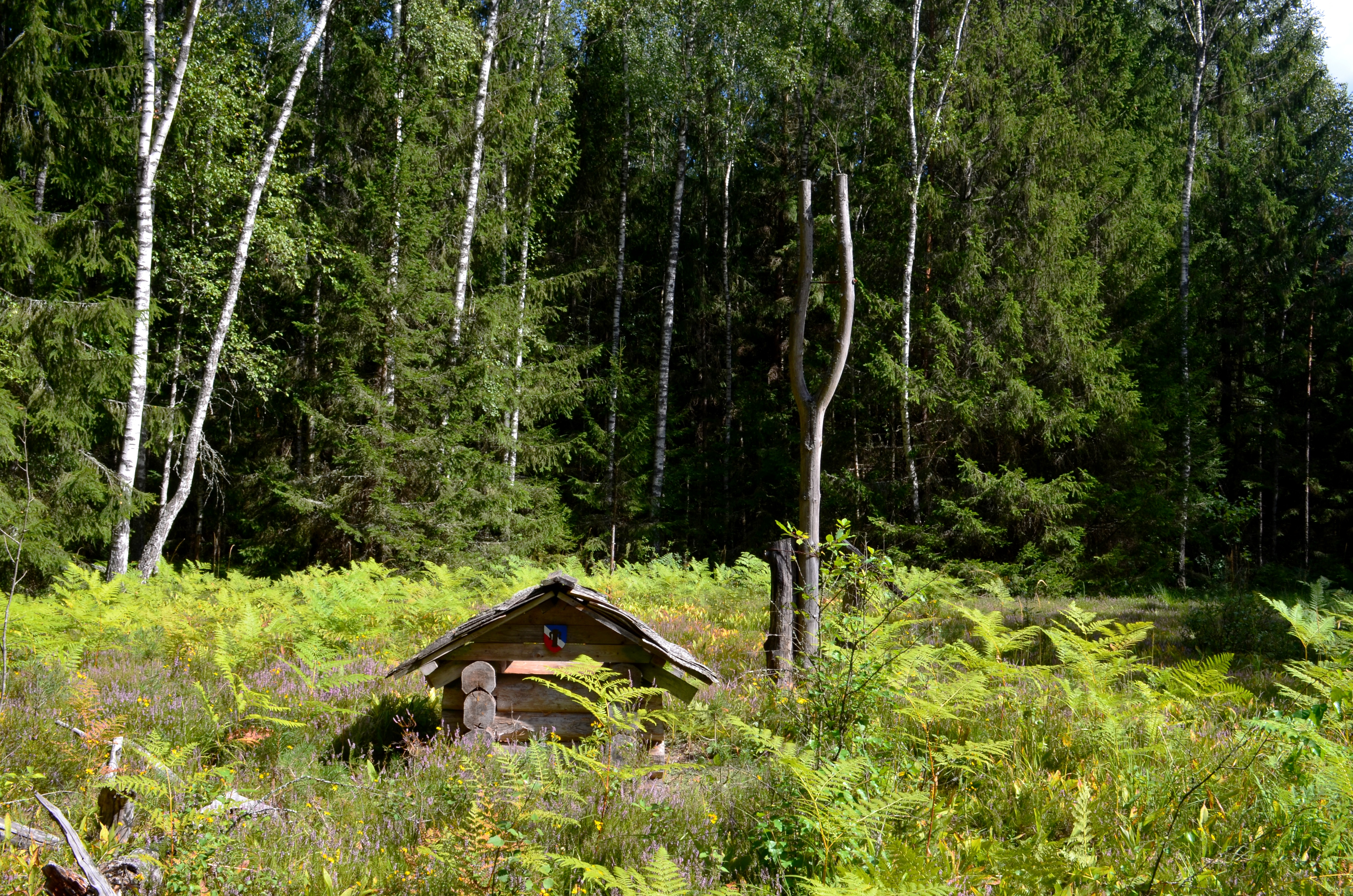 Karaliaus šulinys tarp Musteikos ir Pogarendos, Varėnos raj.